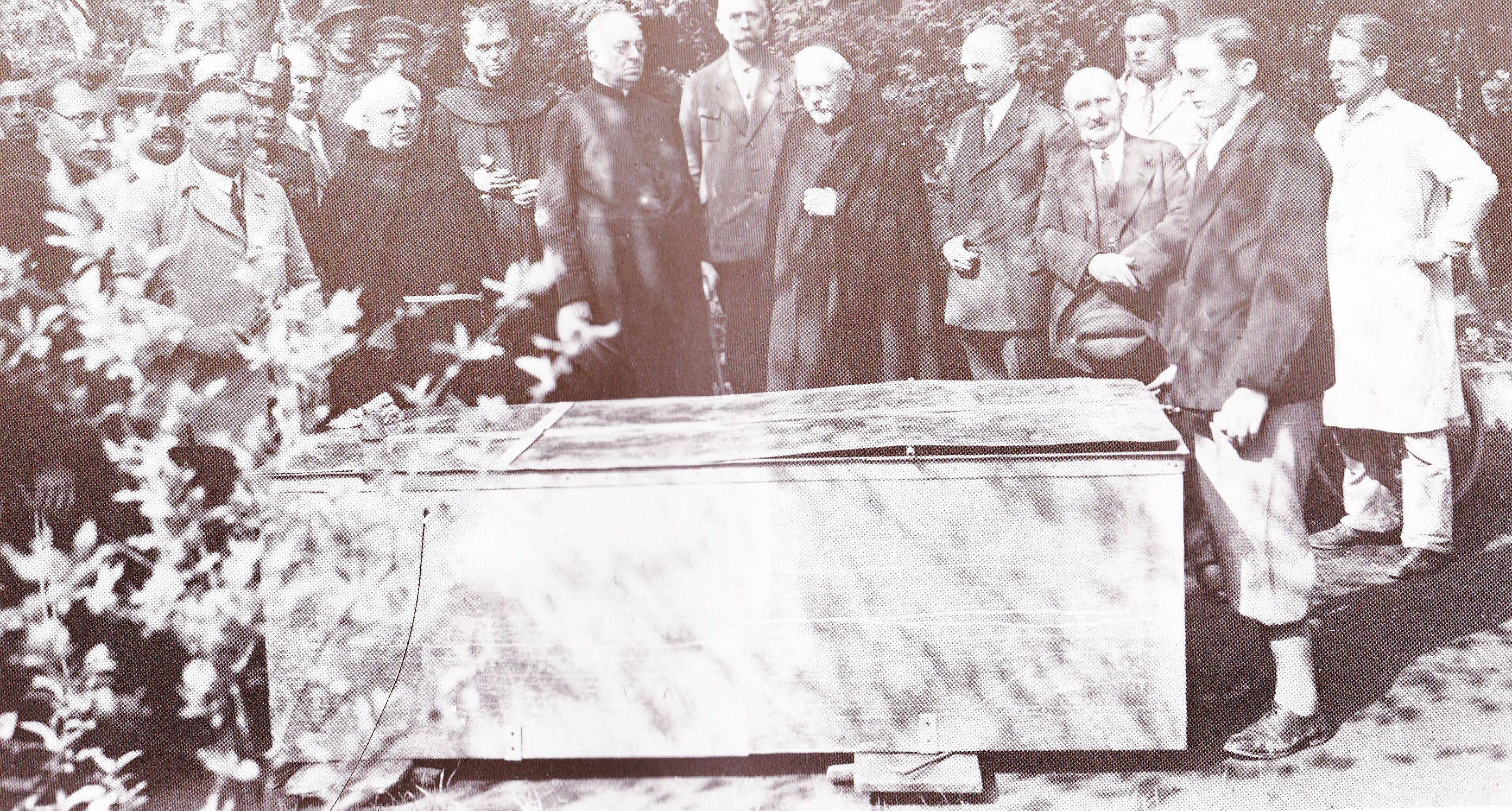 Umbettung des Leichnams von Betkaspar